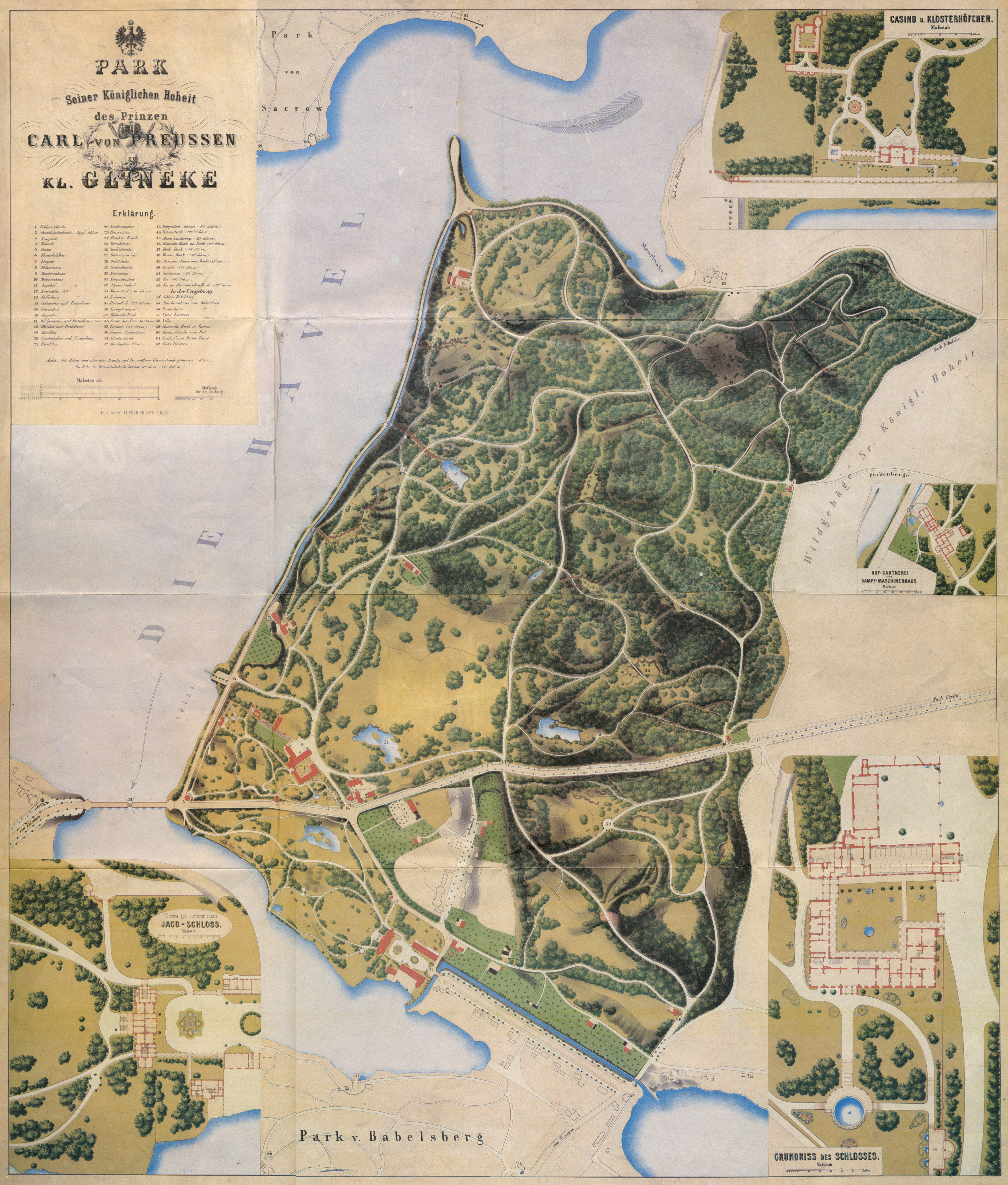 Lithografierter Plan des Glienicker Parks, um 1862